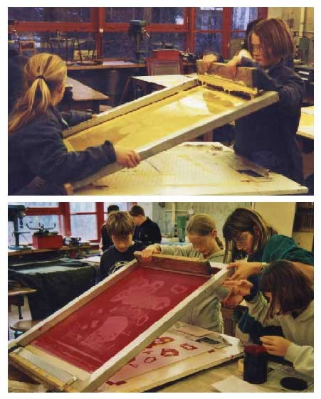 Siebdruck im Schulunterricht